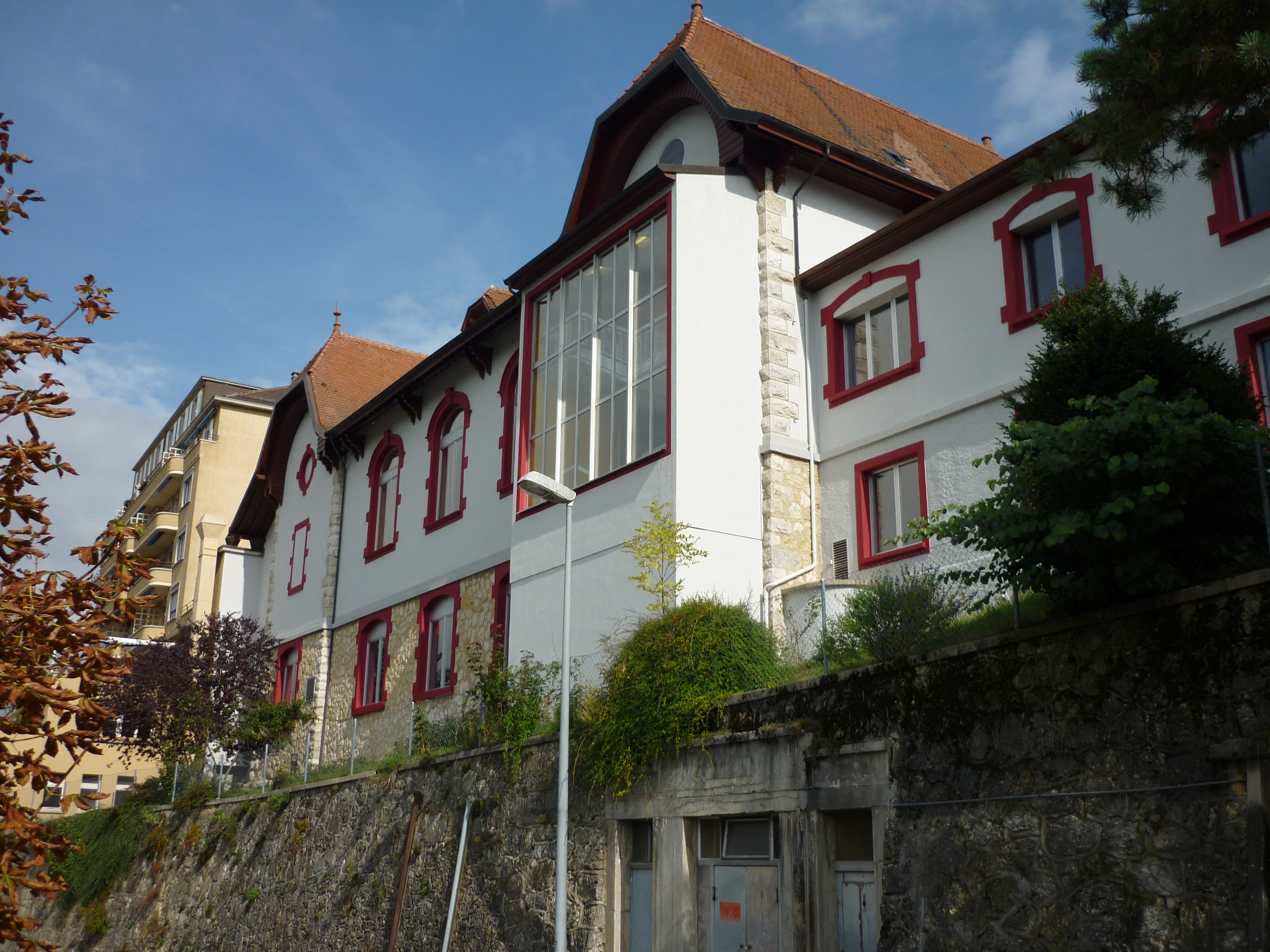 Casino d'Orbe, vue depuis la gare.